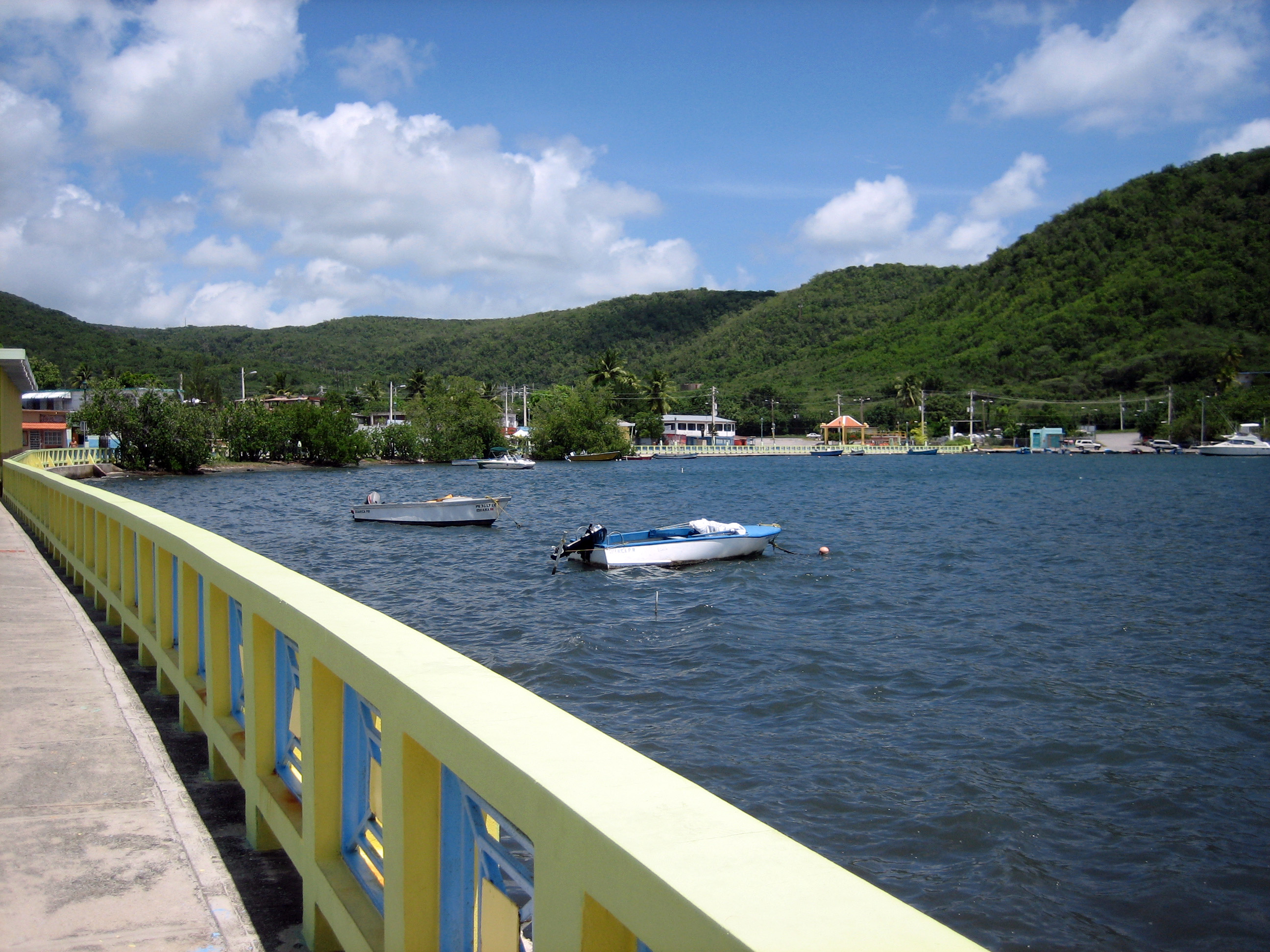 Historic Guanica Bay, Puerto Rico.